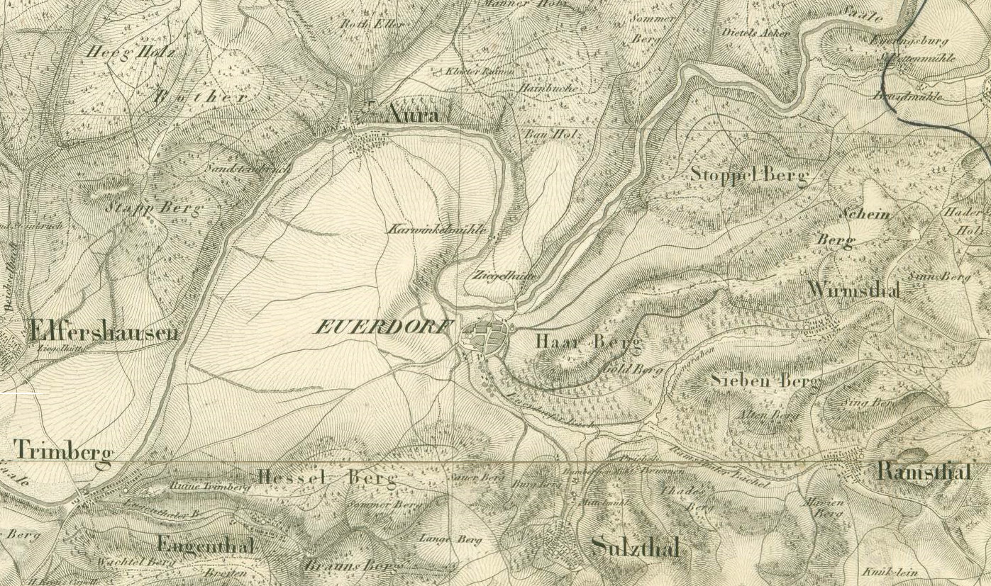 Euerdorf auf einer Karte von 1853 im "Topographischen Atlas vom Königreiche Baiern"